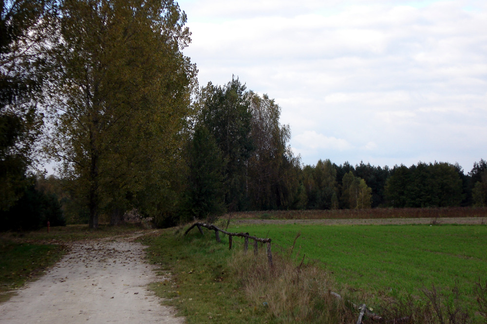 Wieś Praczka, widok w kierunku do rzeki Czarna Włoszczowska.